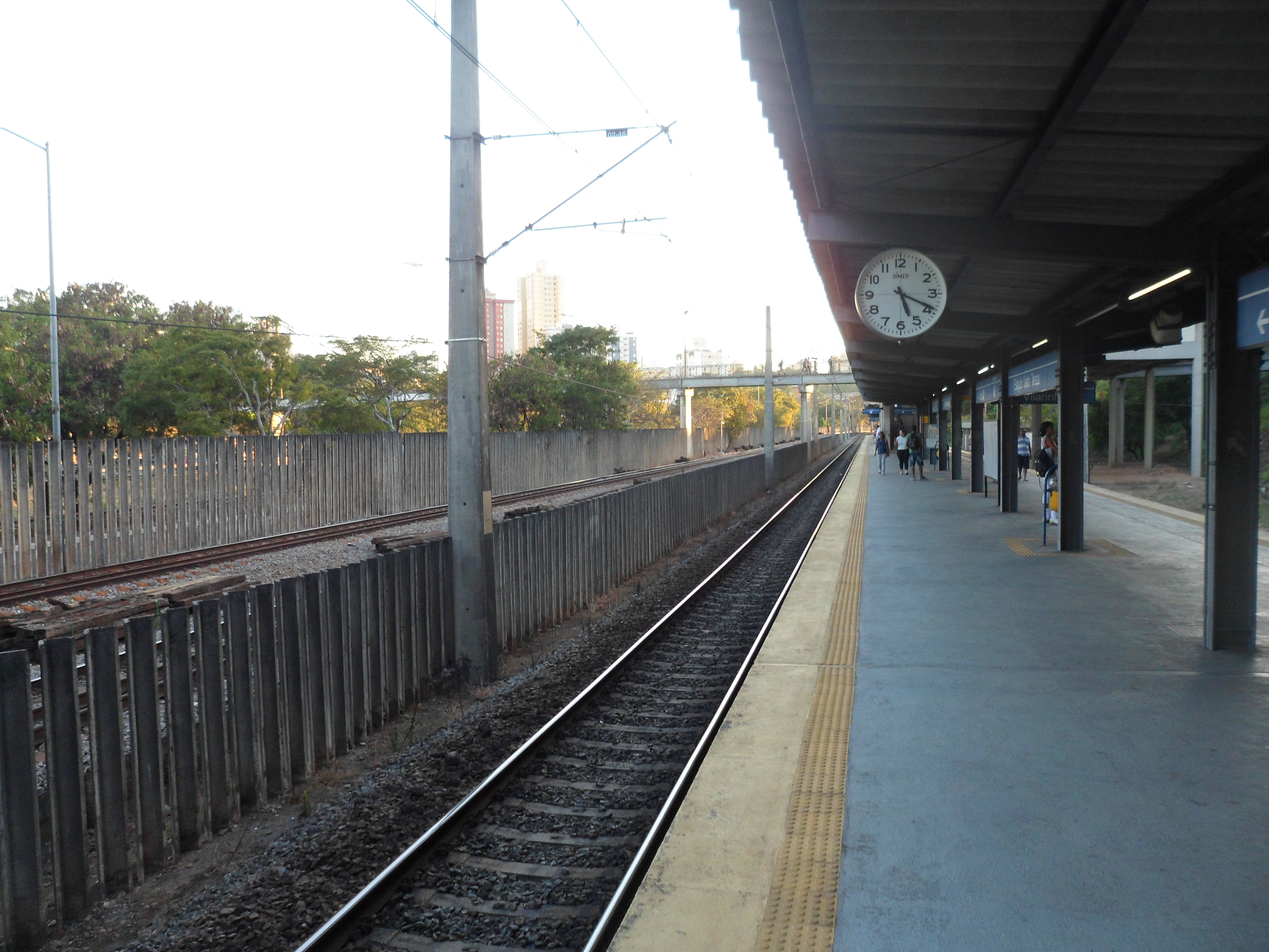 Estação Santa Teresa